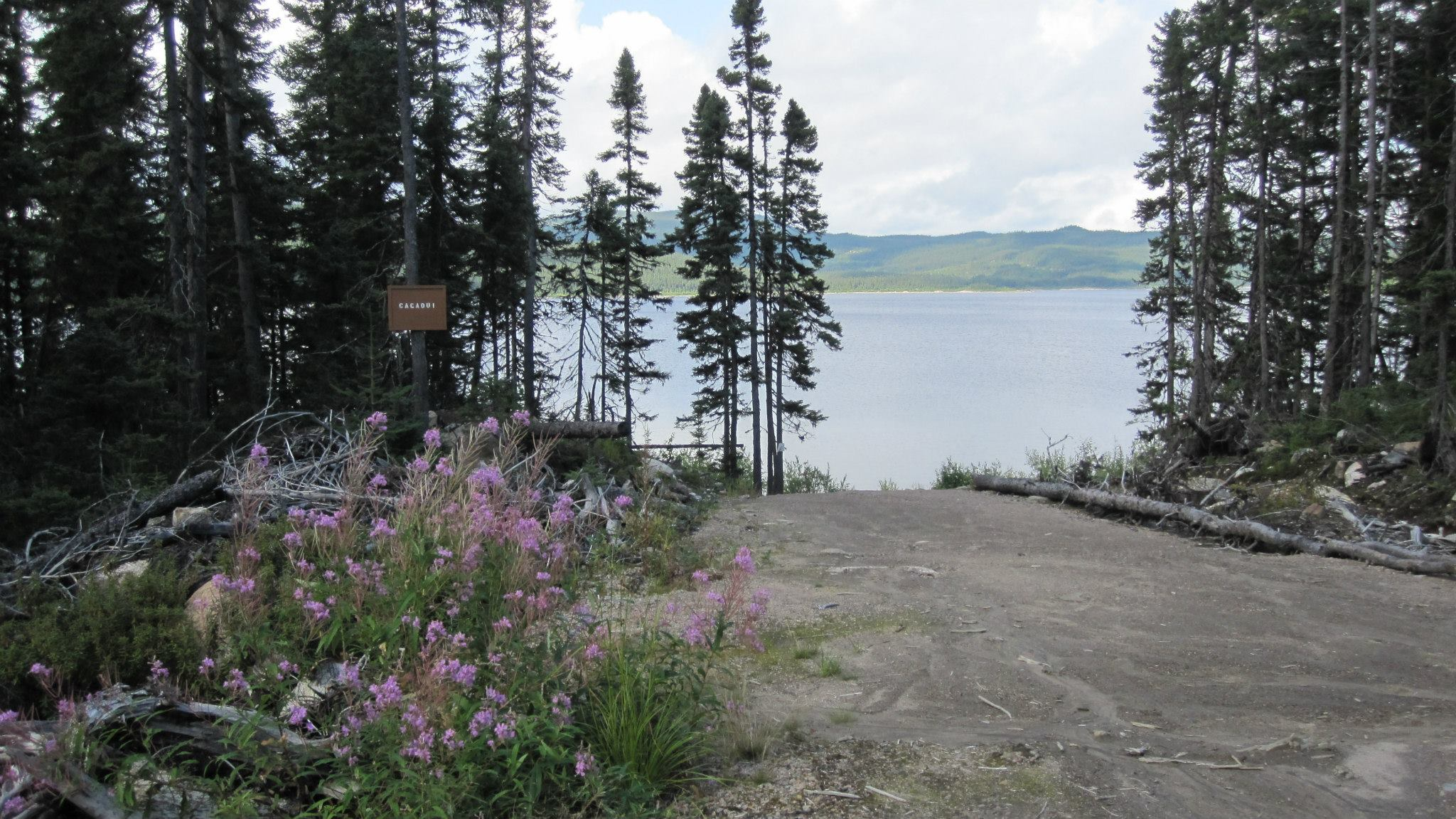 Lac CACAOUI